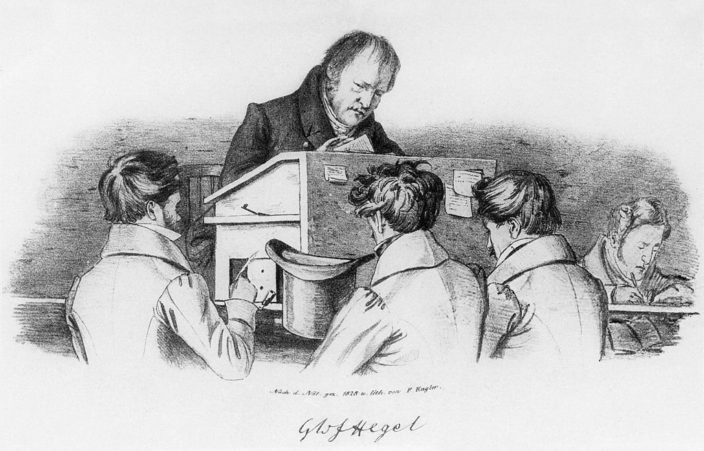 Hegel vor seinen Studenten am Katheder